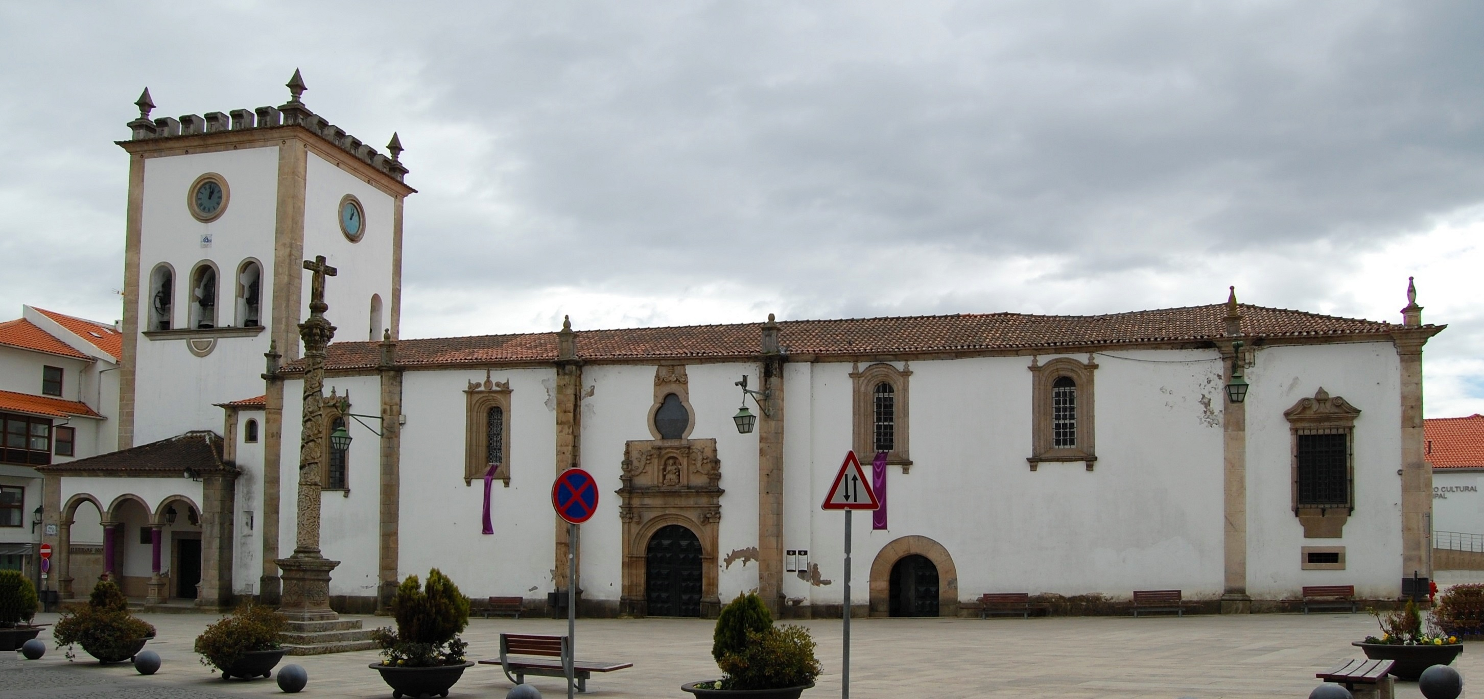 A Sé Velha de Bragança, no nordeste de Portugal.